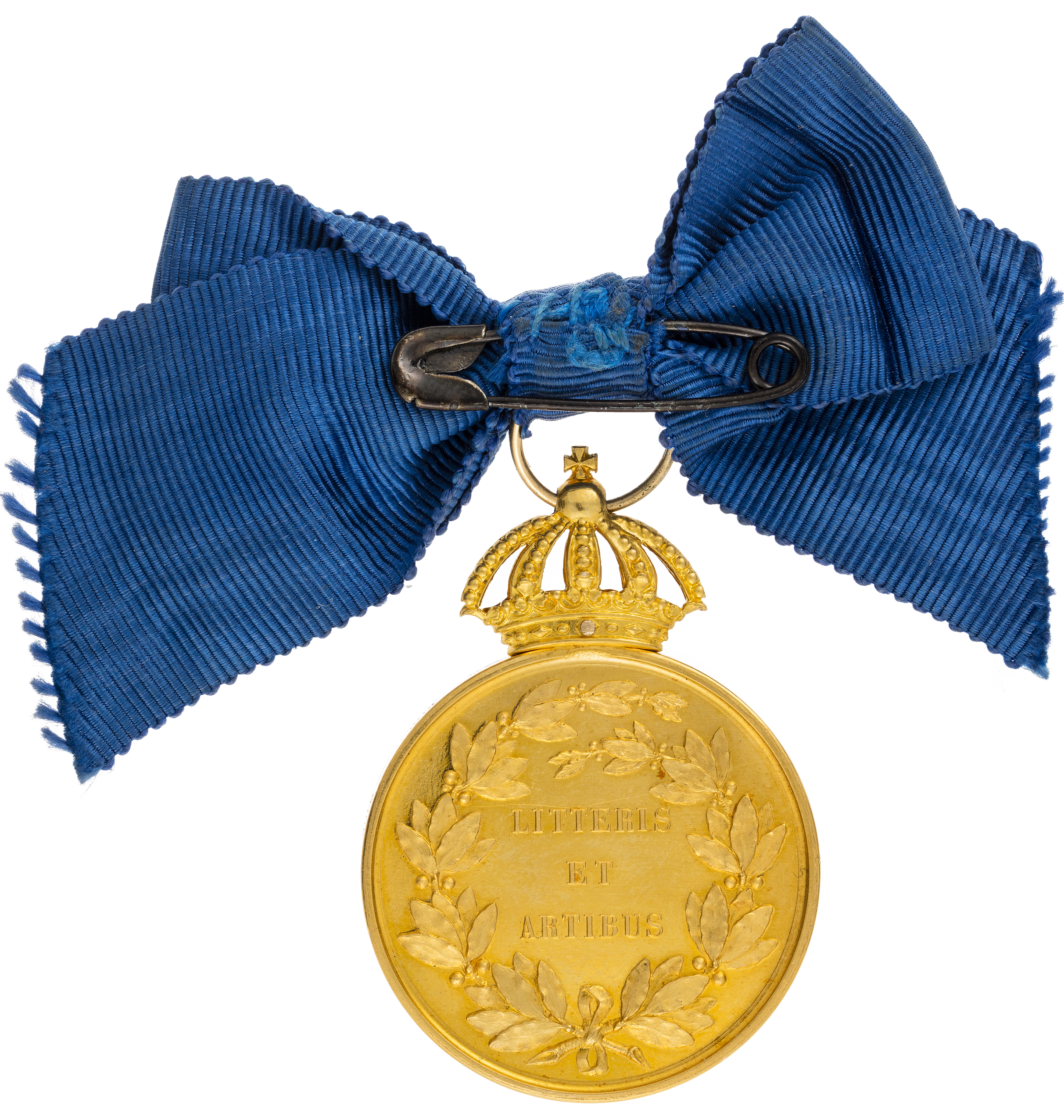 MEDALJEN "LITTERIS ET ARTIBUS" Revers